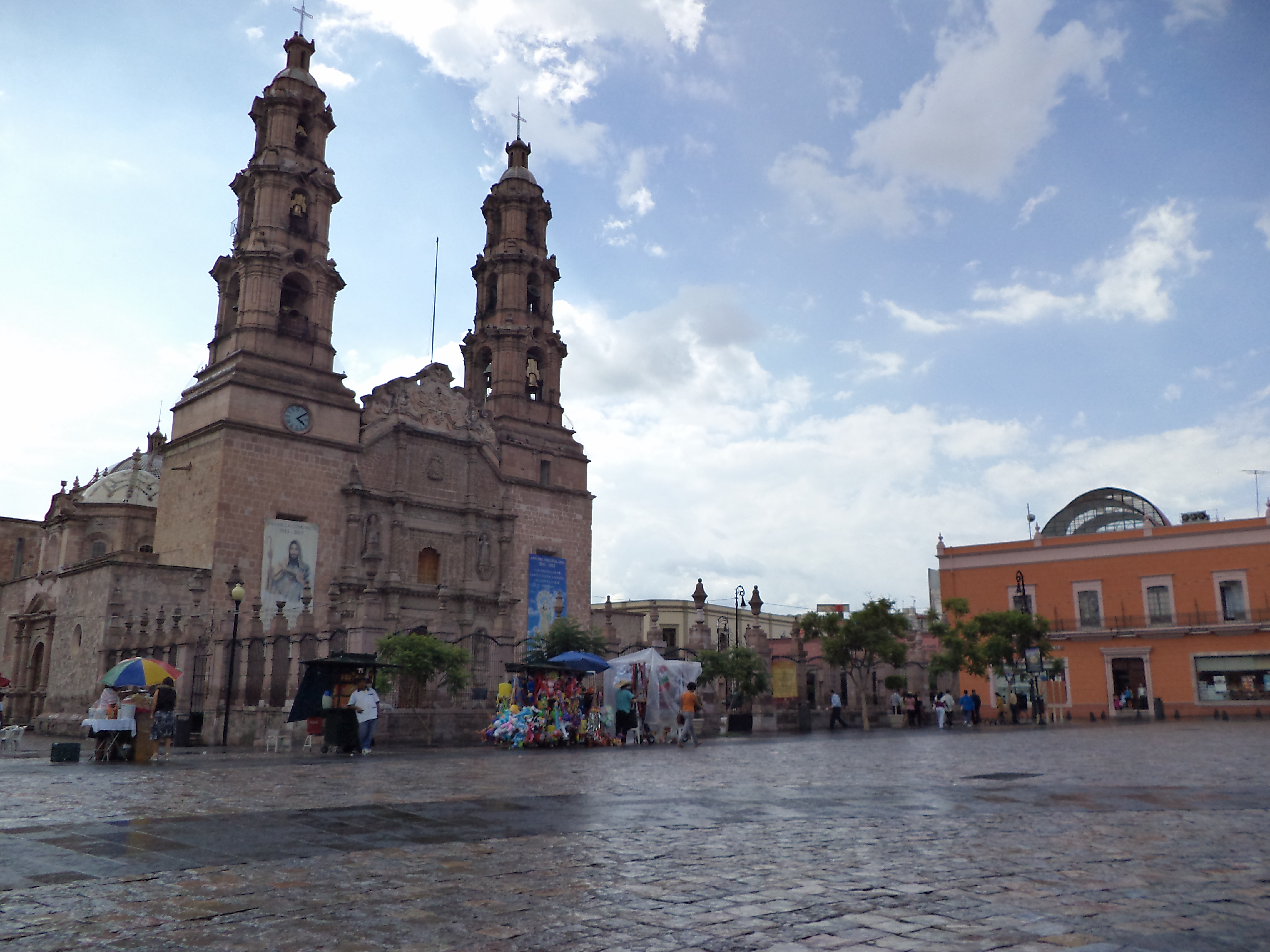 Lluvia en plaza